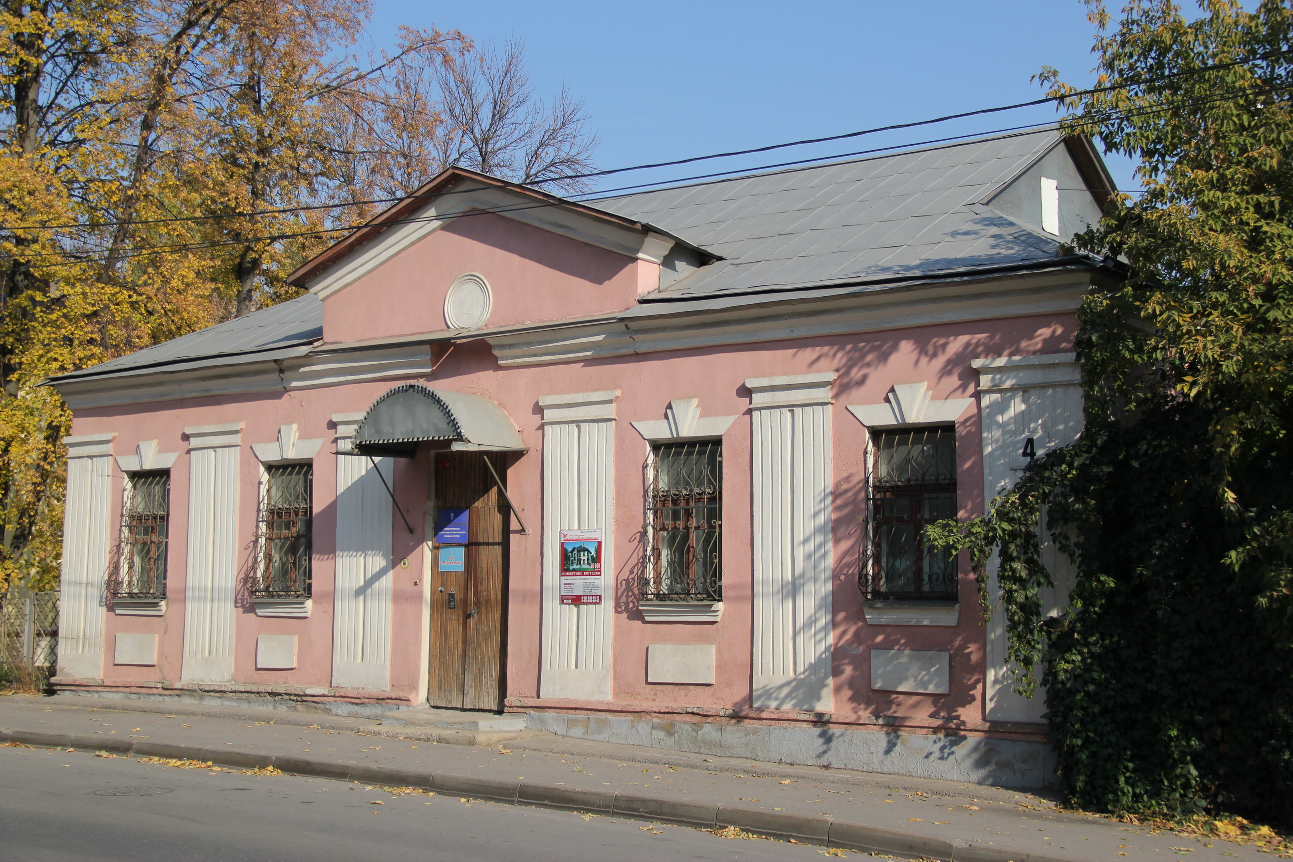 (Липецкая область, Липецк, Максима Горького улица, 4)